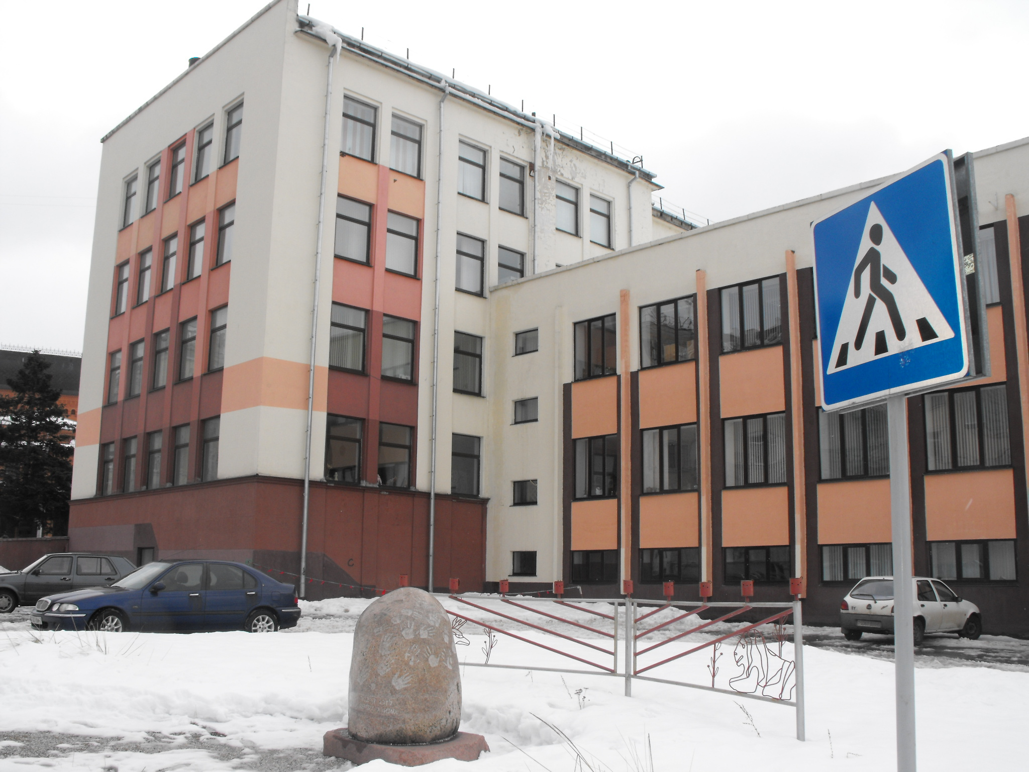 Памятный знак «В память о евреях Могилева — жертвах нацизма», установленный в Могилеве 12 ноября 2008 года возле областной филармонии на месте гетто.